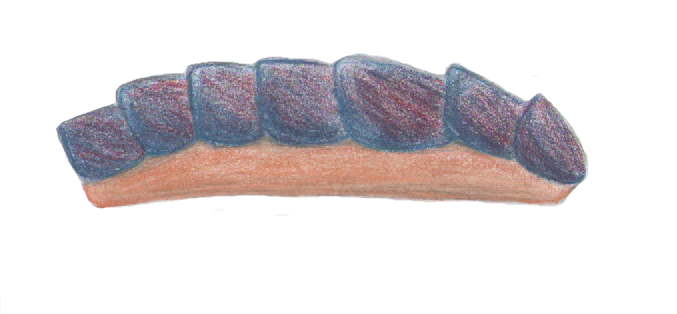 Kulindroplax perossokomos